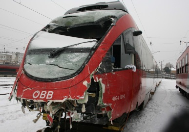 Am 21. Jänner 2013 kam es auf dem eingleisigen Abschnitt der Wiener S-Bahn zwischen Hütteldorf und Penzing zu einem Frontalzusammenstoß zweier vollbesetzter 4024-Garnituren der Vorortelinie S45. 8 Passagiere und einer der beiden Triebfahrzeugführer wurden schwer, 40 Reisende und der andere Triebfahrzeugführer leicht verletzt. Beim S-Bahn-Unfall in Penzing beschädigter Talent 4024 102